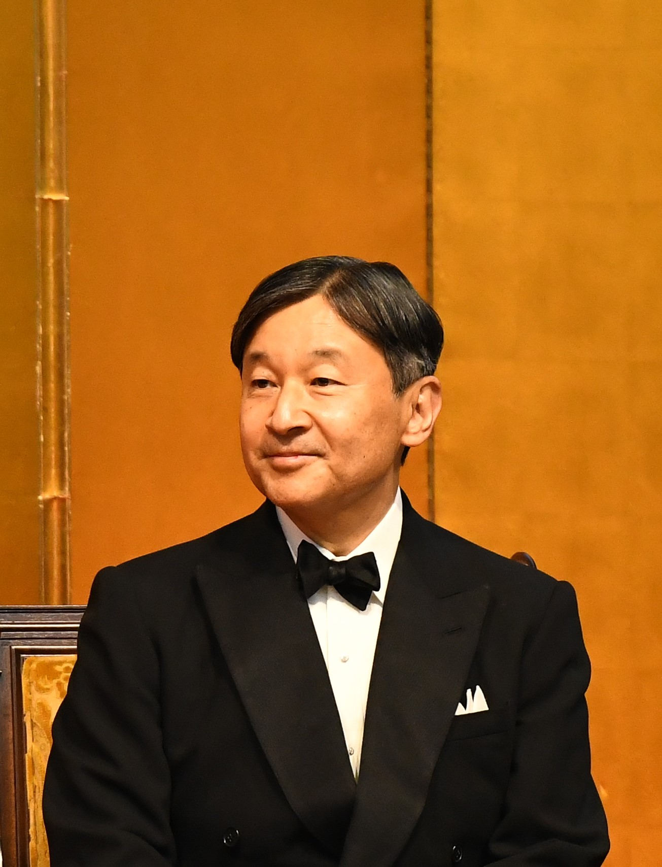 TICAD7に臨席した徳仁（第126代天皇）